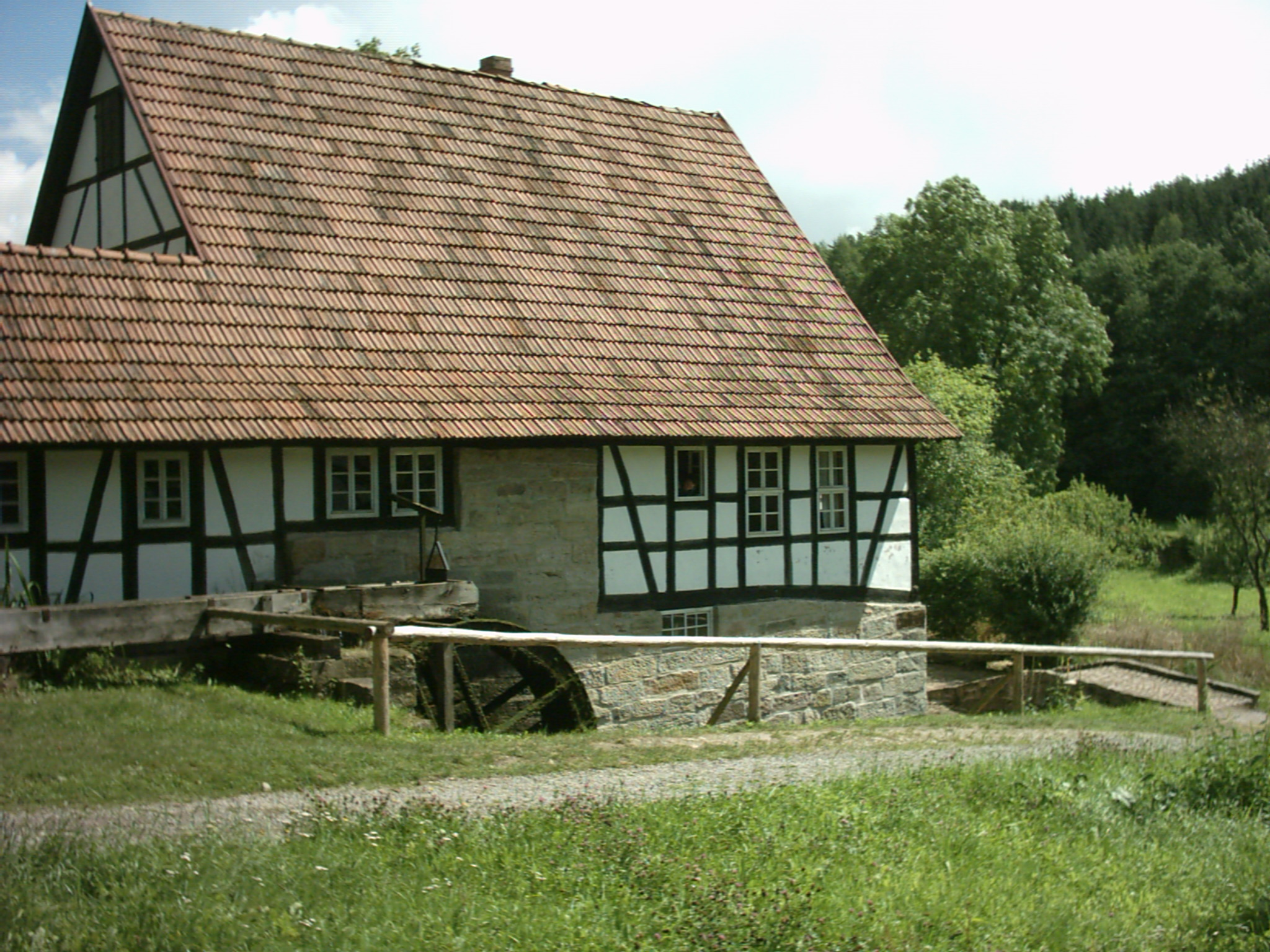 Alte Wassermühle im Hennebergischen Museum Kloster Veßra Fotograf: presse03, selbst fotografiert 2005 Lizenz: GNU-FDL